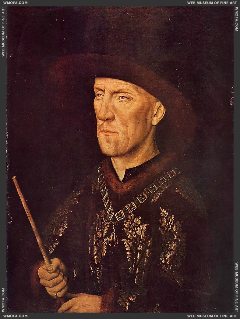 "Portrait of Baudouin de Lannoy". Staatliche Museen zu Berlin, Gemaldegalerie, Berlin.